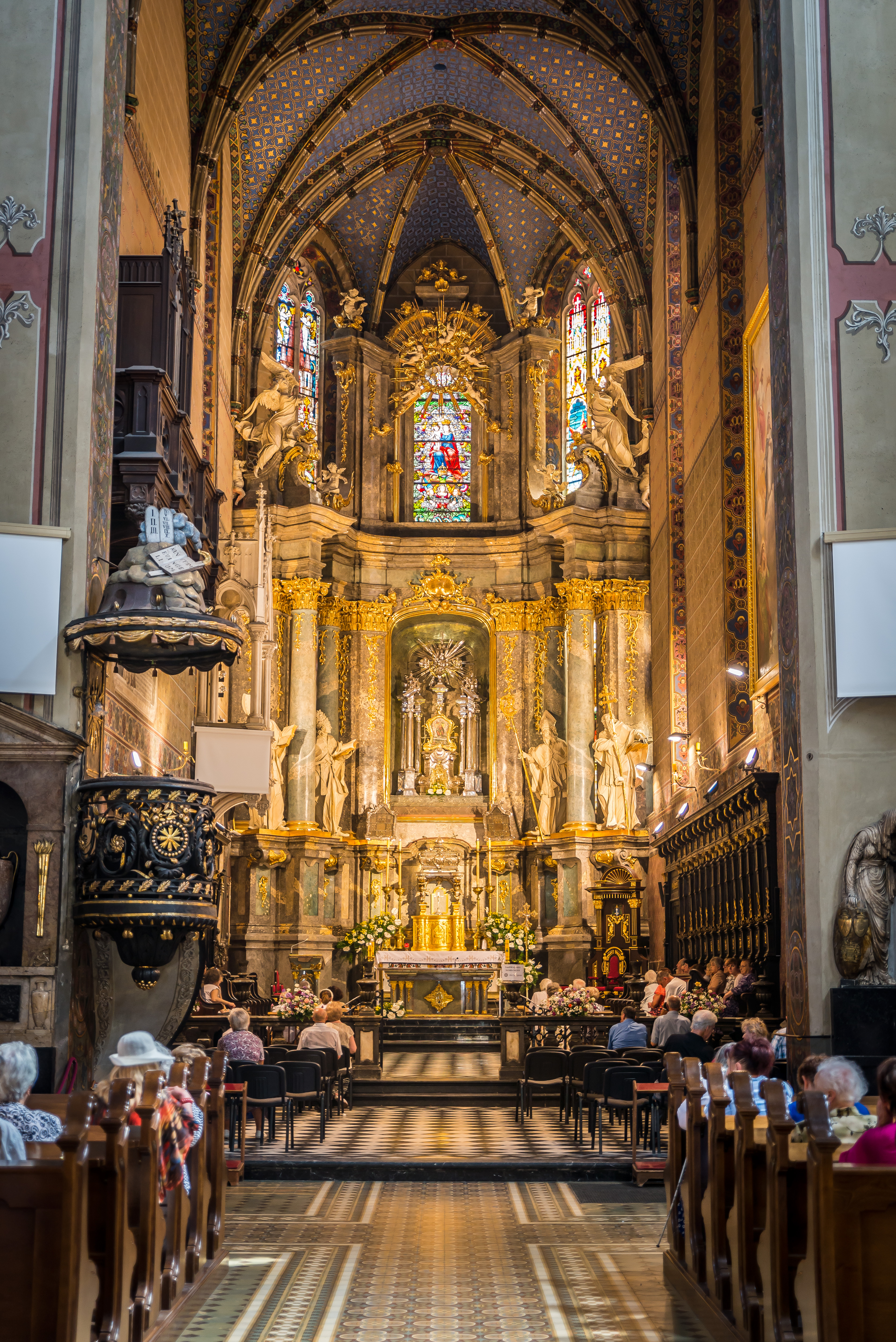 собор Кафедральний, Львів, Катедральна пл., 1